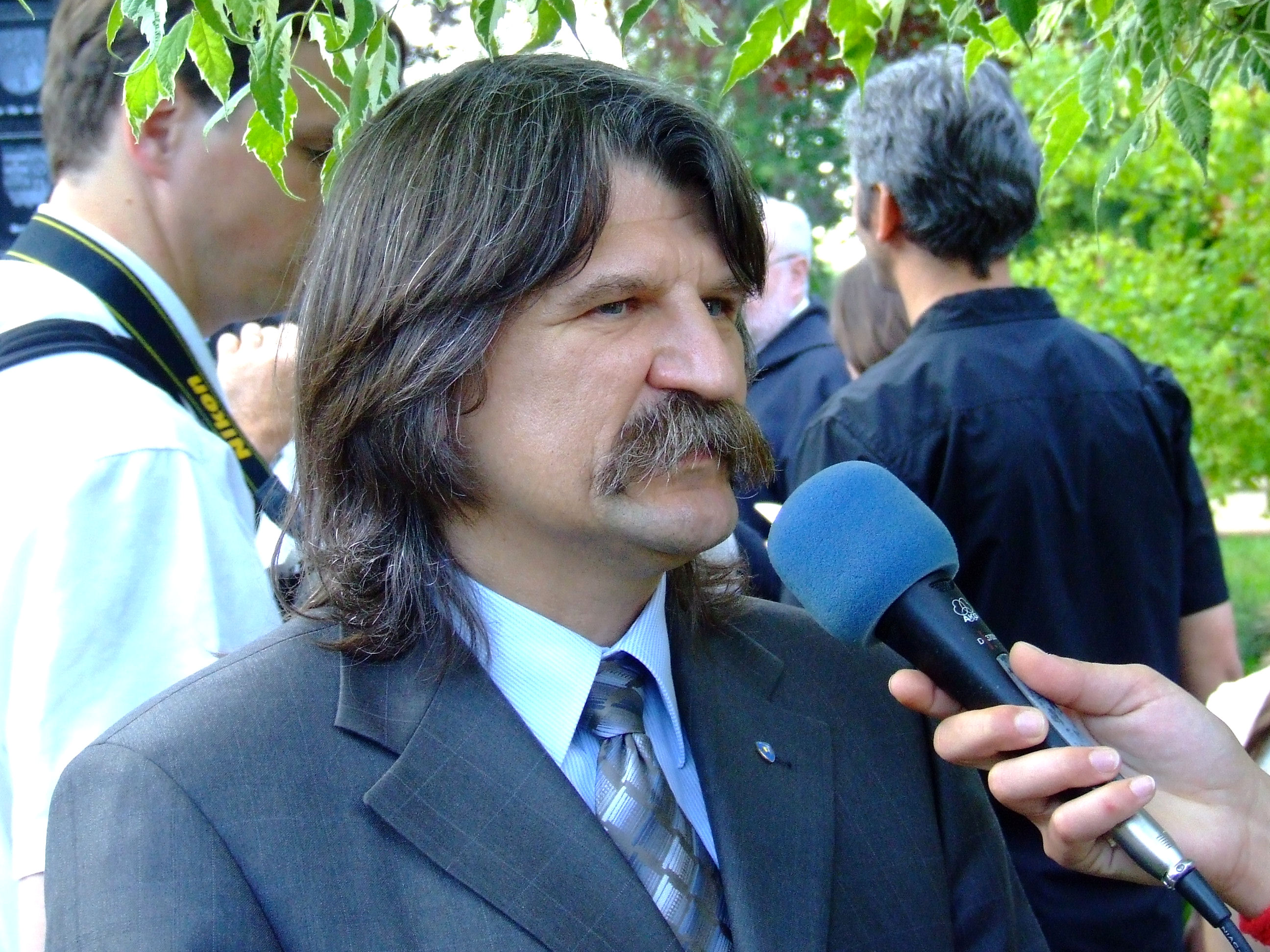 Kövér László politikus, miniszter